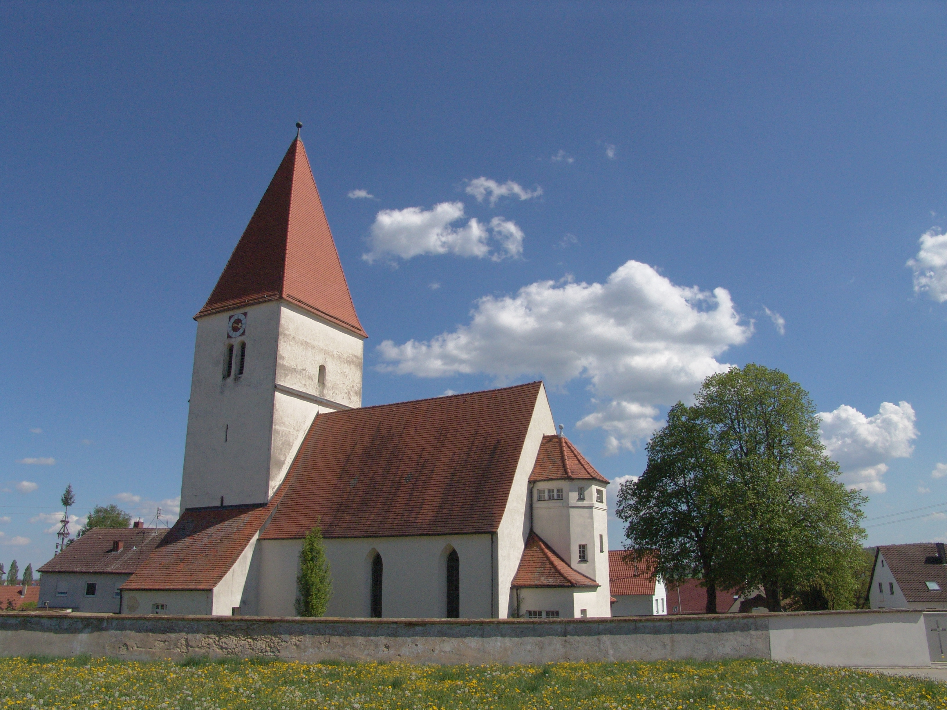 evang.-luth. Marienkirche in Nähermemmingen